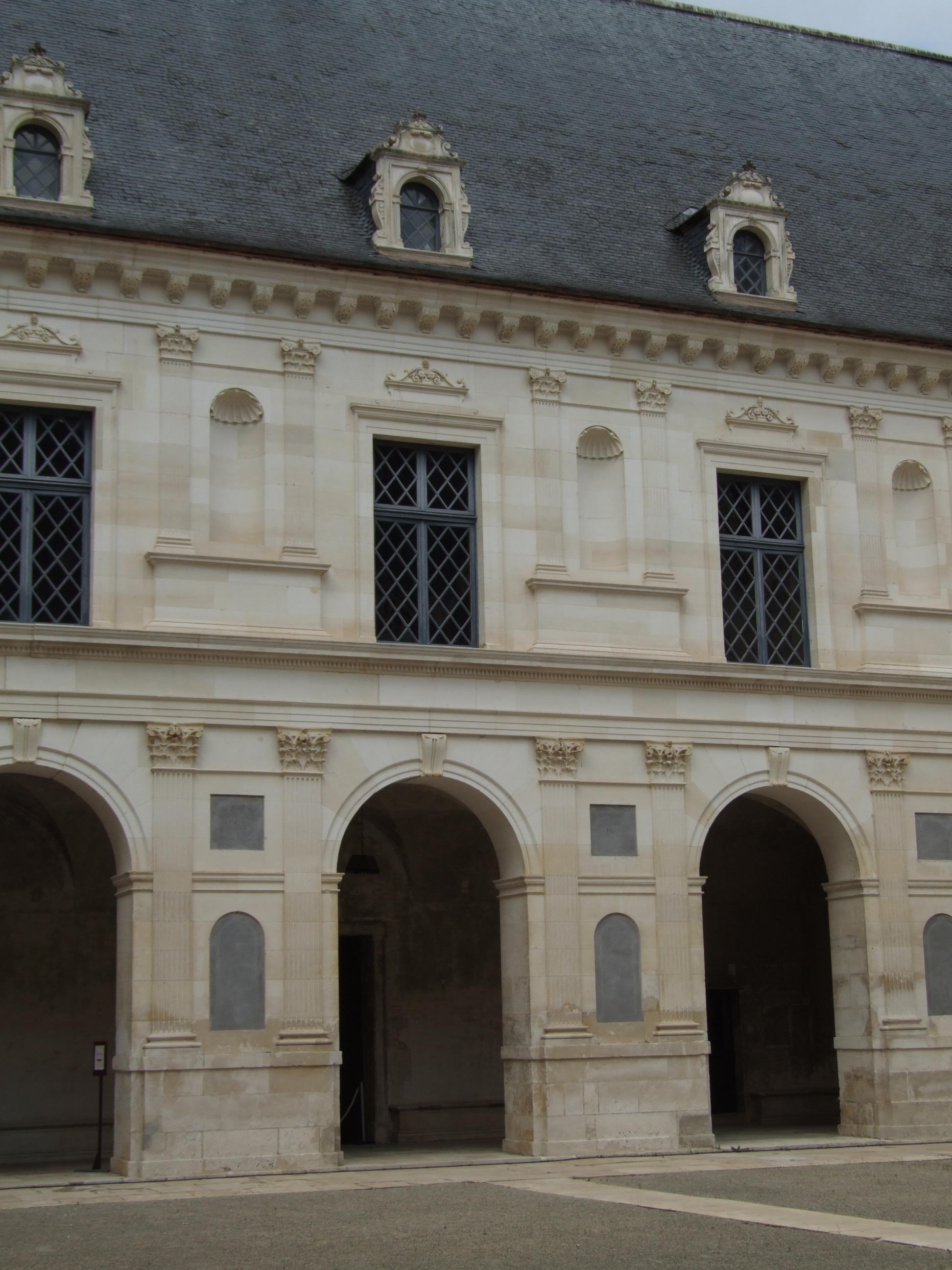 Château d'Ancy-le-Franc, Yonne, Bourgogne, FRANCE